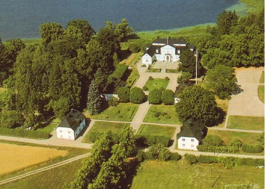 Danbyholm